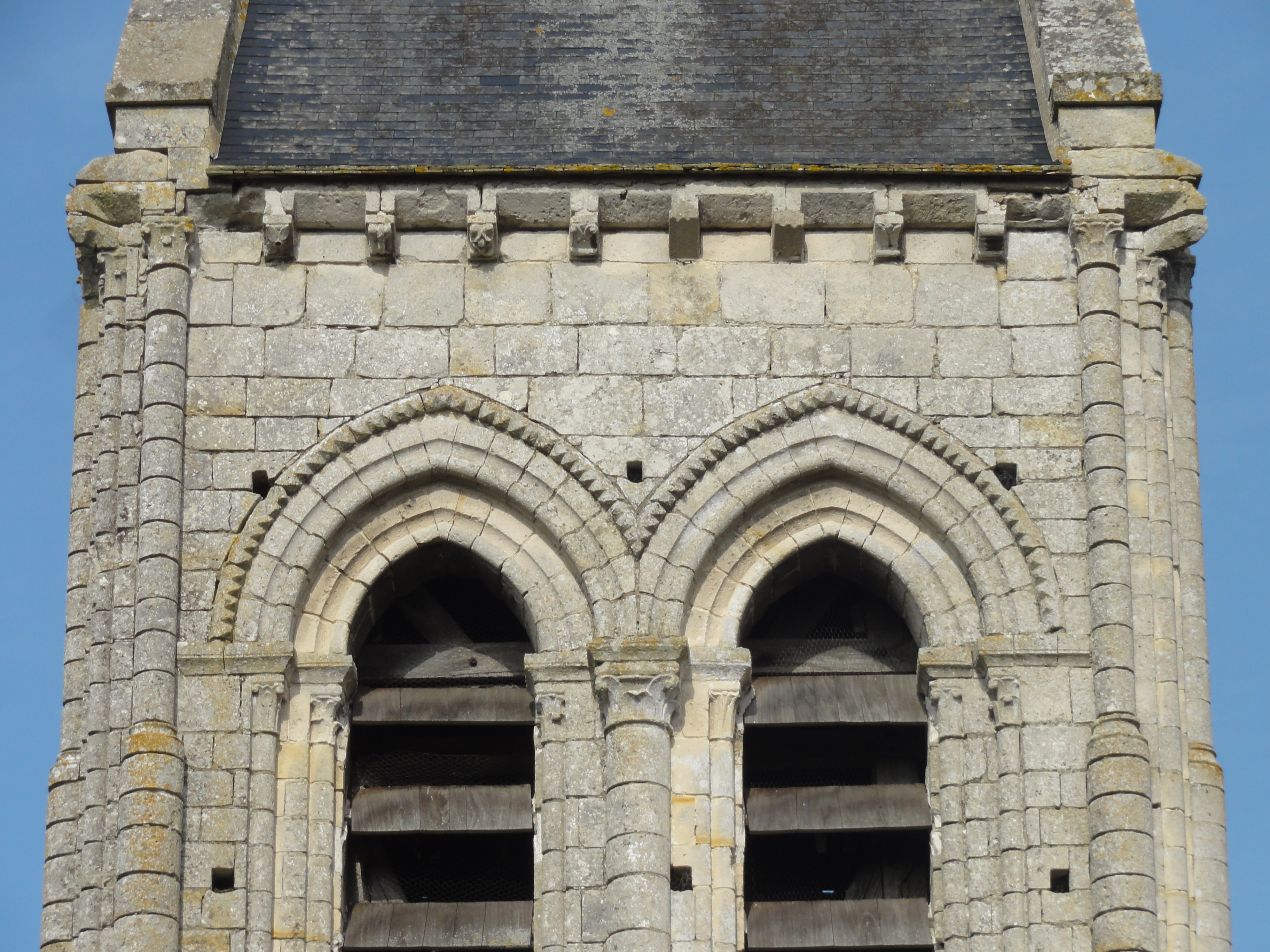 Église Saint-Léger de Delincourt - voir titre.